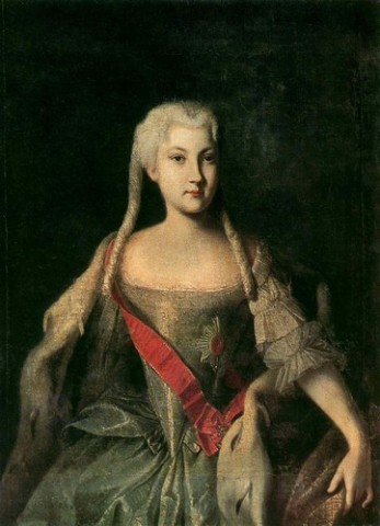 Портрет Анны Леопольдовны. Иркутский областной художественный музей им. В.П.Сукачева